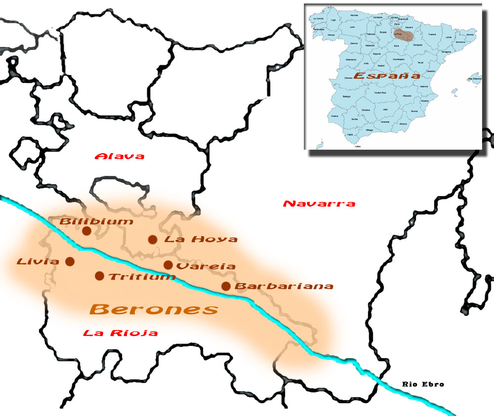 Mapa de la situacion de los Berones y con algunas de sus poblaciones